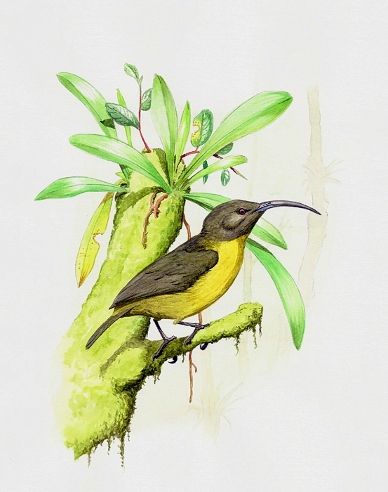 Toxoramphe à tête grise - Aquarelle, 2011, Romain Risso.